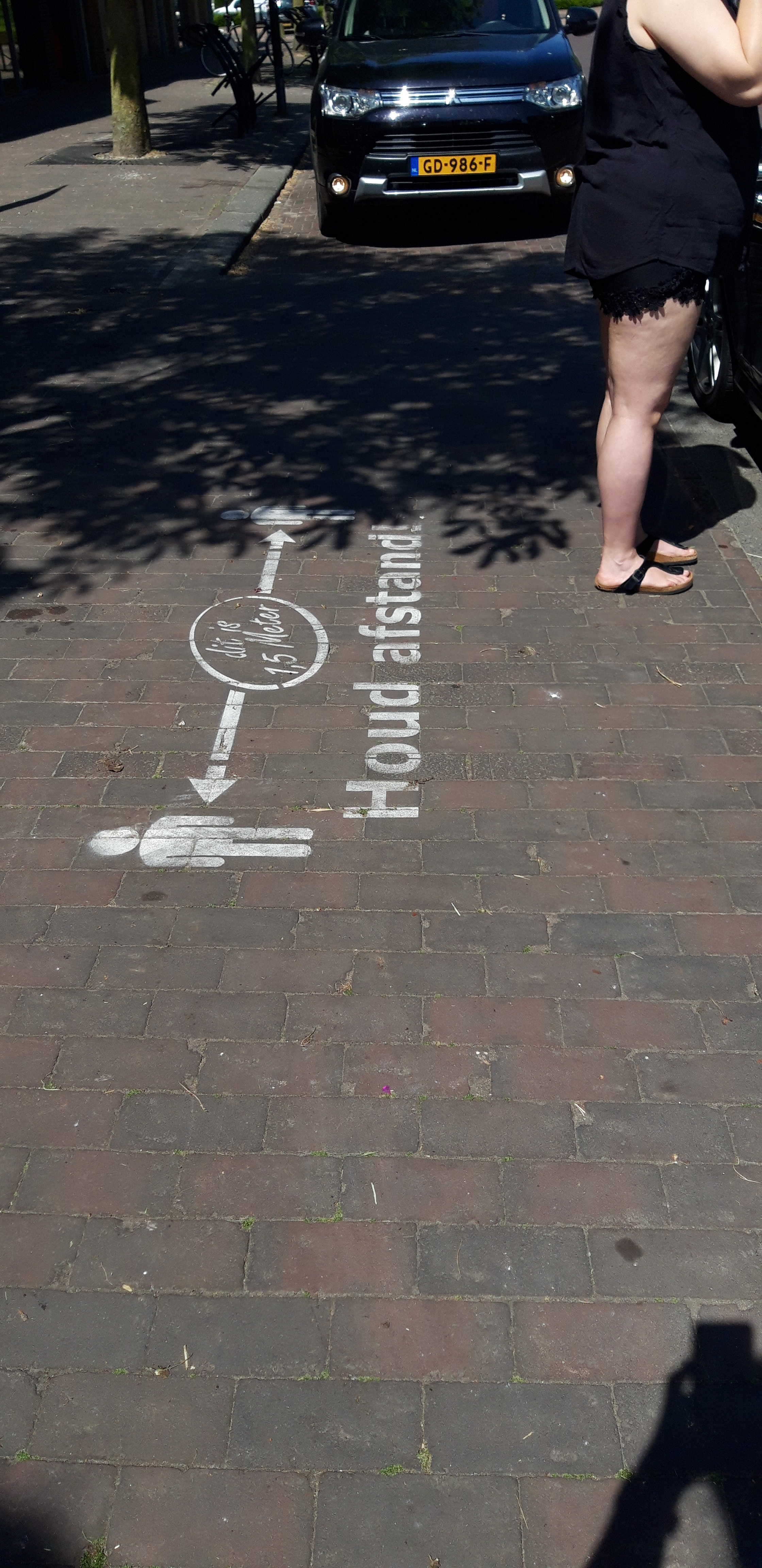 houdt afstand waarschuwing in Zegveld